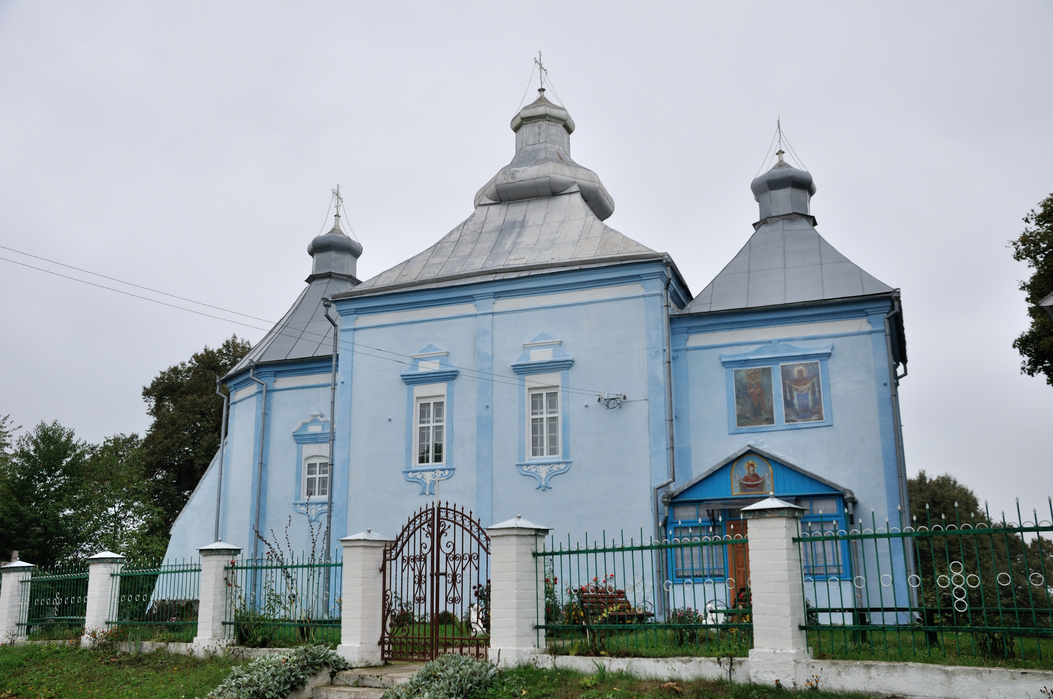 Покровська церква, с. Країв